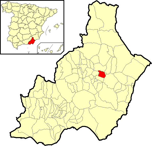 Situación del término municipal de Albánchez respecto a la provincia de Almería, en España.